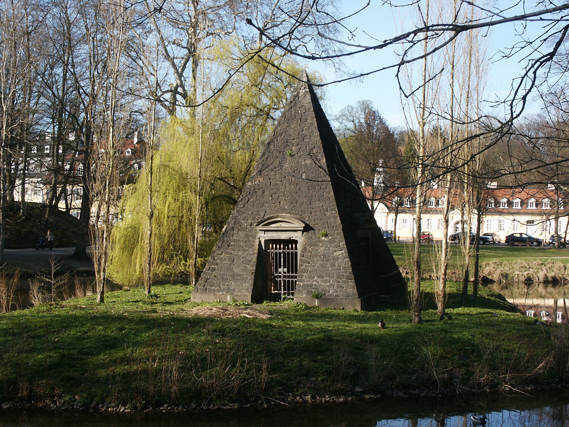 Von mir selbst erstellt...